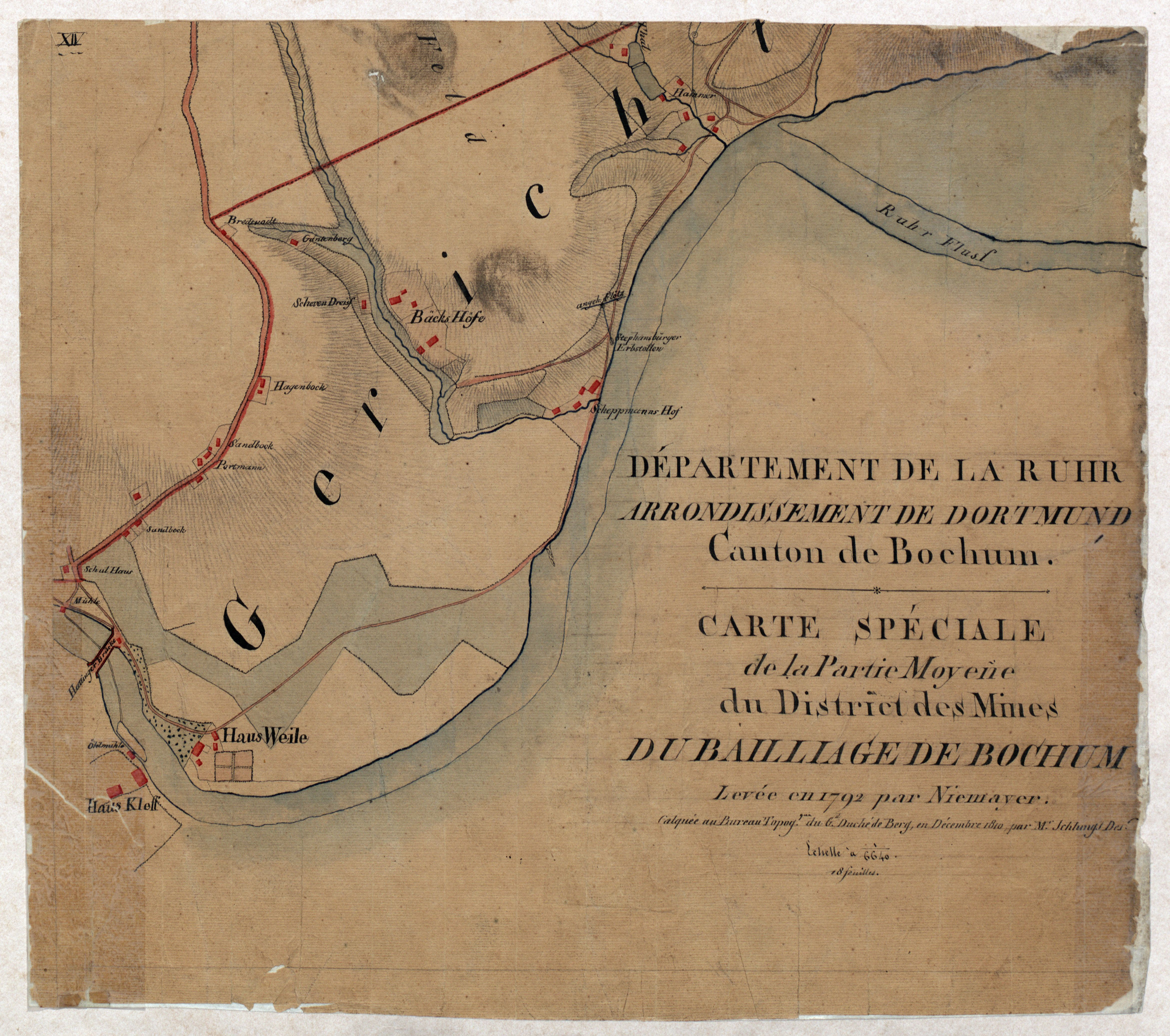 Spezialkarte des mittleren Bergwerkdistrikts des Amts Bochum Nachdruck als „Carte speciale des mines“.